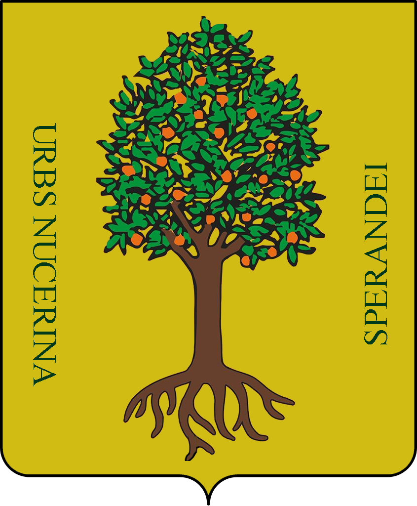 Riadattazione dello stemma dell'antica università di Nocera Sperandei, realizzato seguendo le ricerche storiche usate anche dalle associazioni rievocative del territorio. La riproduzione è approssimata ed ha un puro fine informativo e didattico.